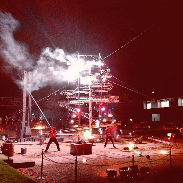 Mad rollercoaster spektakel tijdens 100 jaar Katoen Natie in Kallo